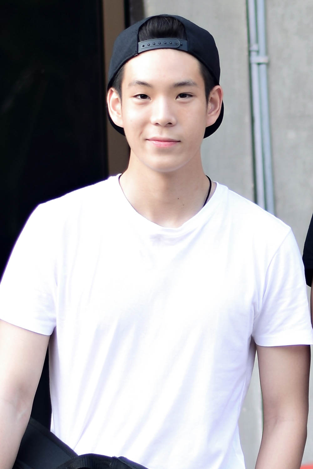 เจเจ กฤษณภูมิ พิบูลสงคราม